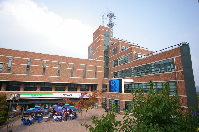 동아방송예술대학 학생회관